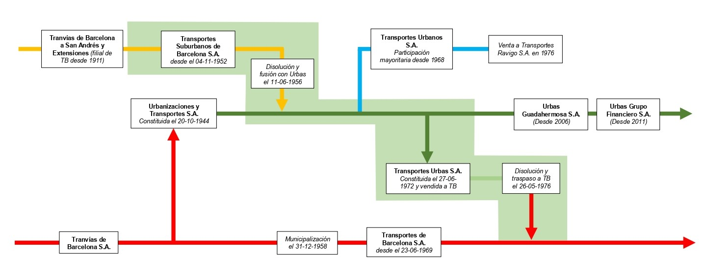 Historiograma que refleja la evolución societaria de la red de autobuses suburbanos de Barcelona, conocida bajo el acrónimo de Urbas.